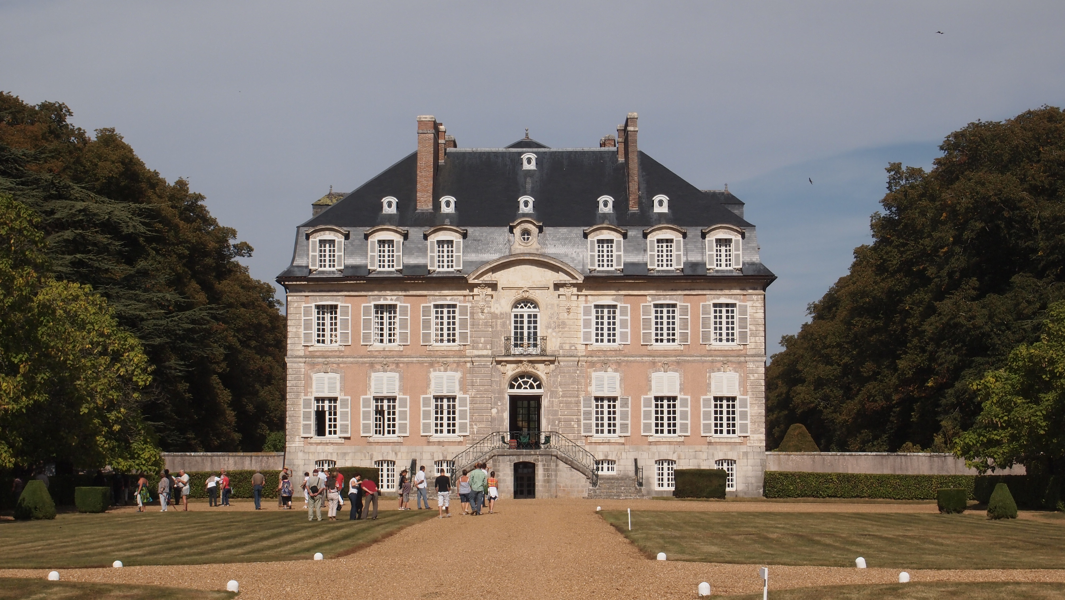 Château de Reverseaux, vu de l'entrée du parc.